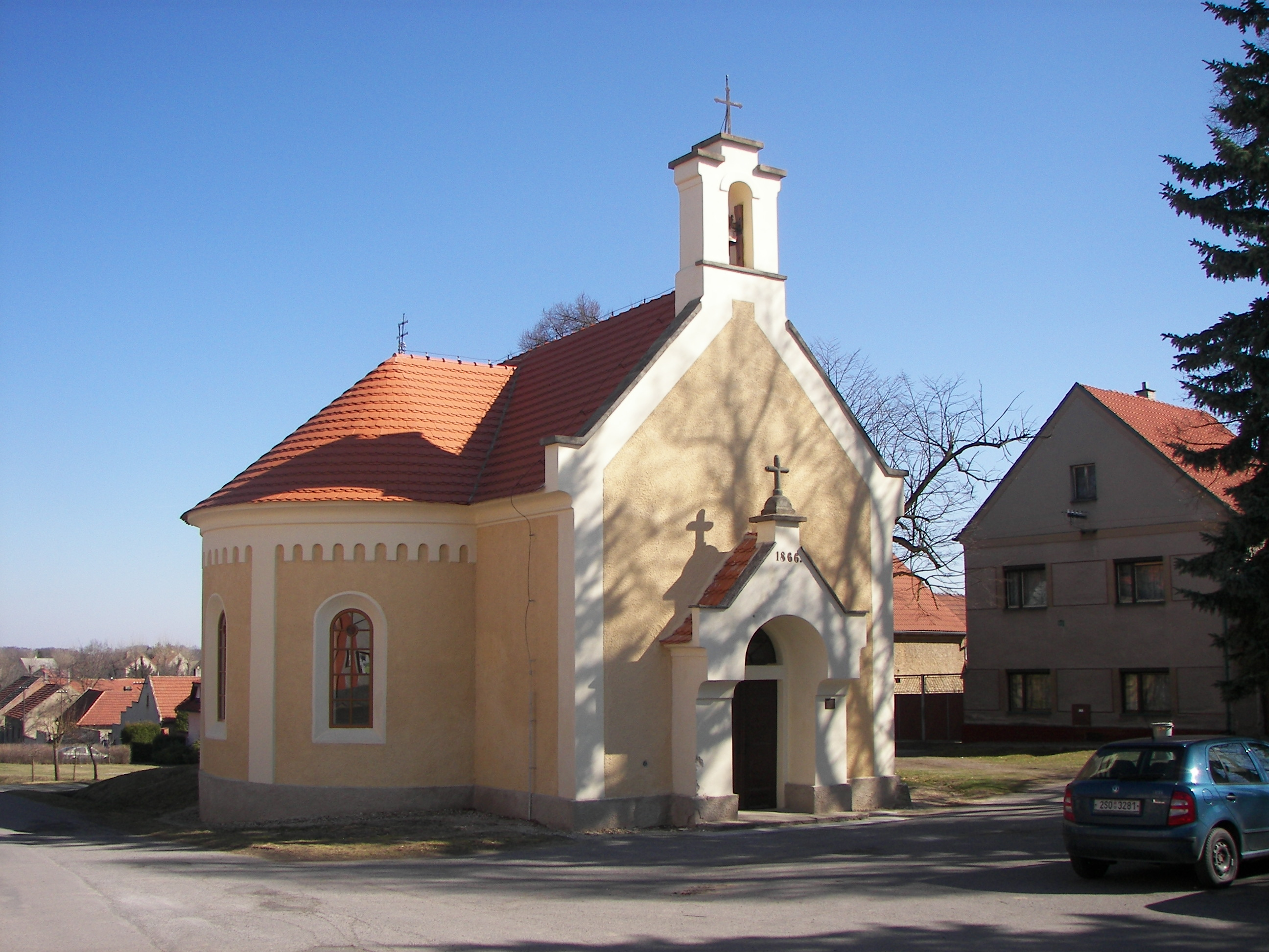 Kaple svatého Jana Křtitele